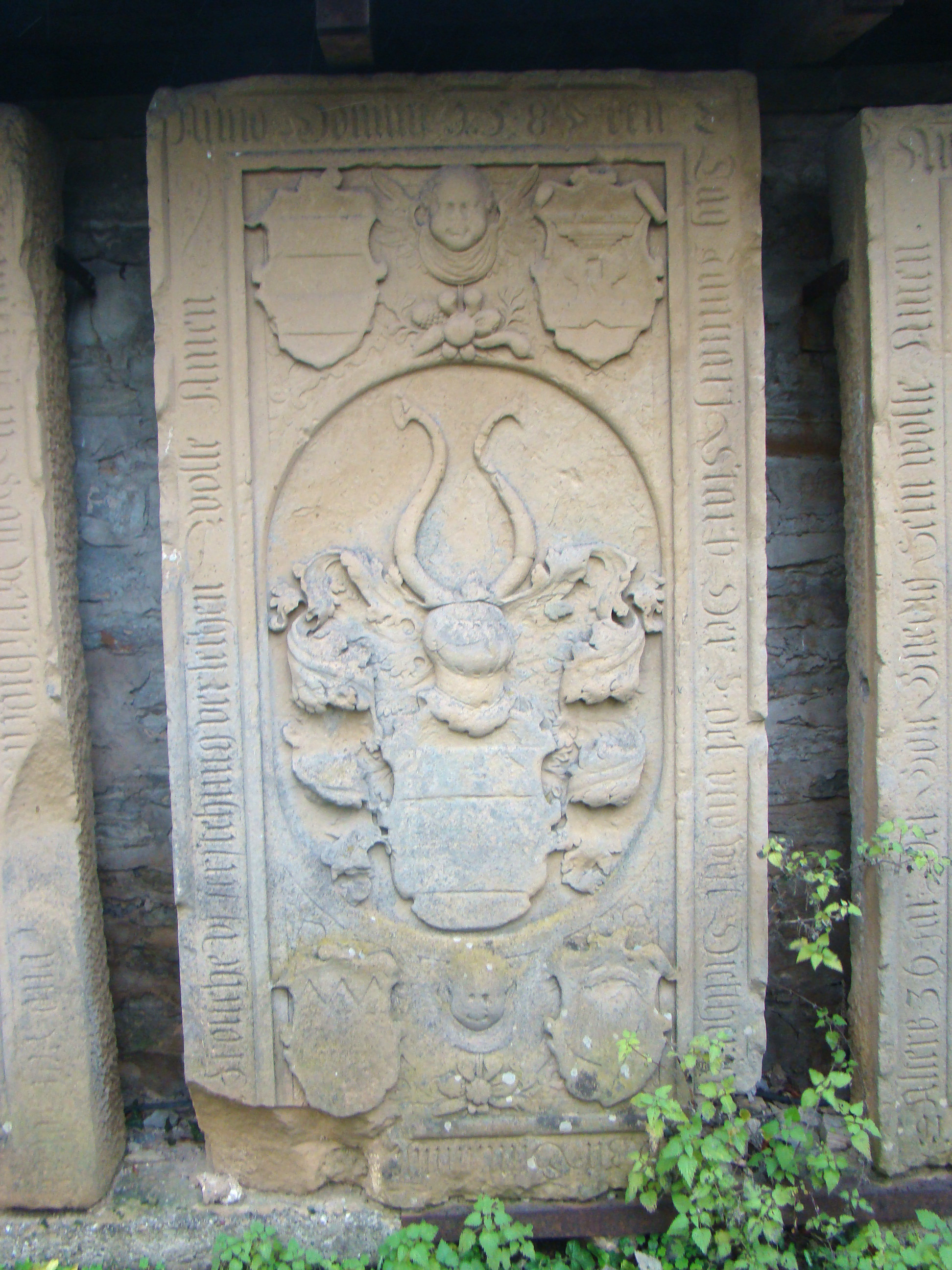 Historische Grabmale beim Unterschloss Gemmingen: Dietrich von Gemmingen († 1587), Sohn von Wolf von Gemmingen (um 1479–1555) und Anna Marschalk von Ostheim (um 1500–1569), Wappen der Eltern oben: Gemmingen-Marschalk von Ostheim